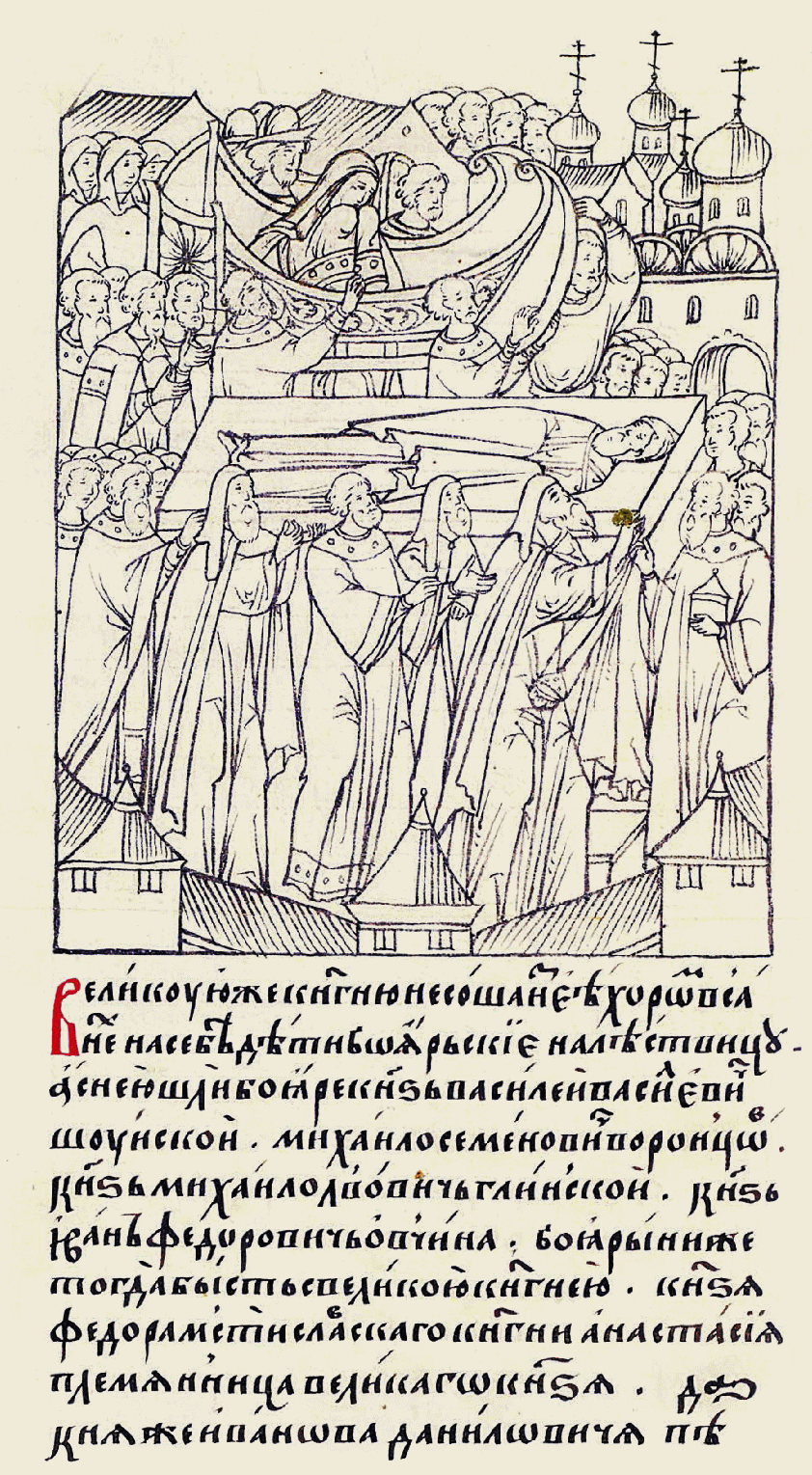 Великую же княгиню несли из ее хором в санях на себе дети боярские на лестницу, а с нею шли бояре: князь Василий Васи- льевич Шуйский, Ми- хаил Семенович Во- ронцов, князь Михаил Львович Глинский, князь Иван Федорович Овчина; боярыни же тогда были с вели- кою княгинею: князя Федора Мстиславско- го княгиня Анастасия, племянница великого князя, да князя Ивана Даниловича Пенкова